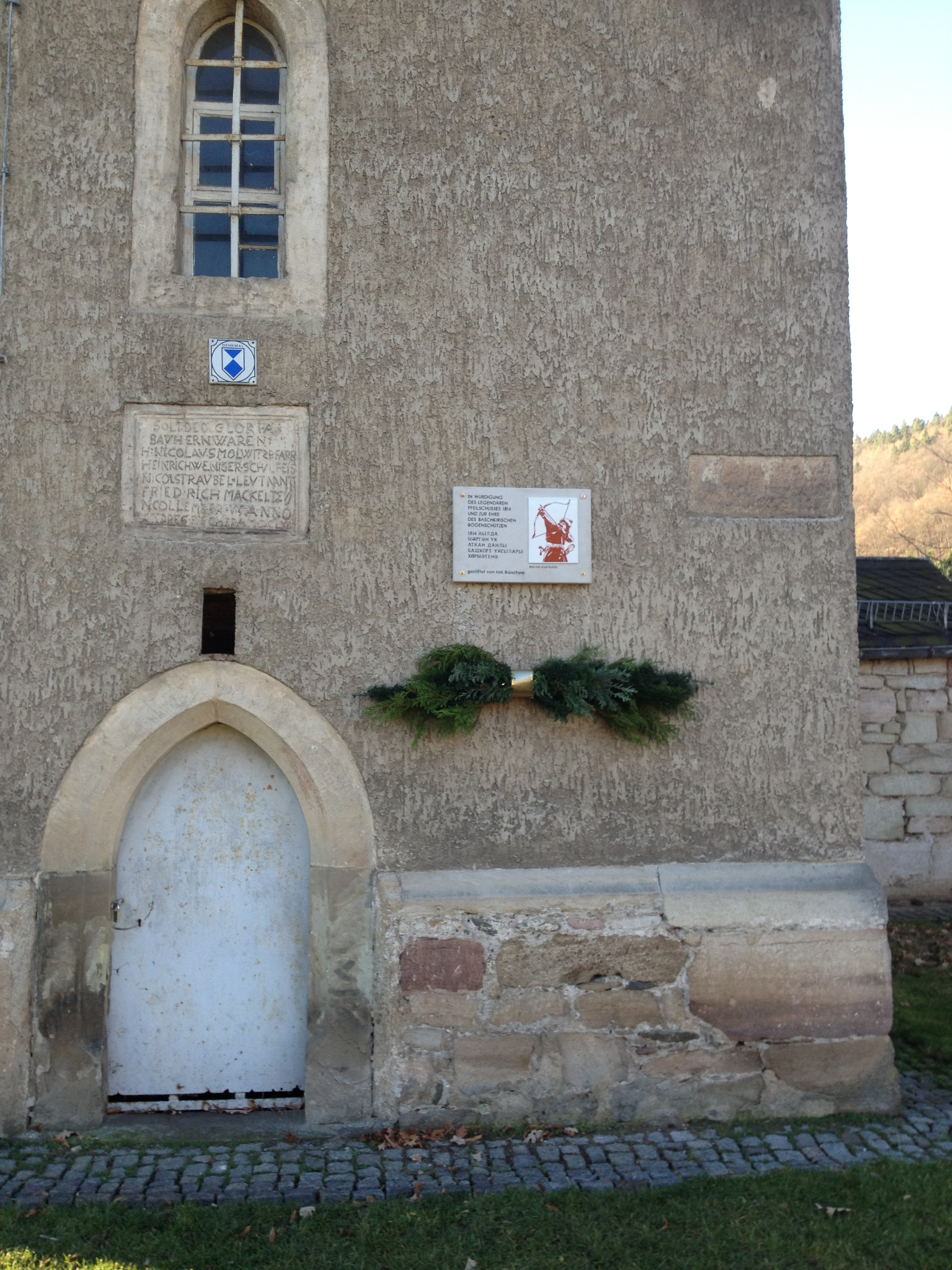 Мемориальная доска у фасада здания в г. Шварце